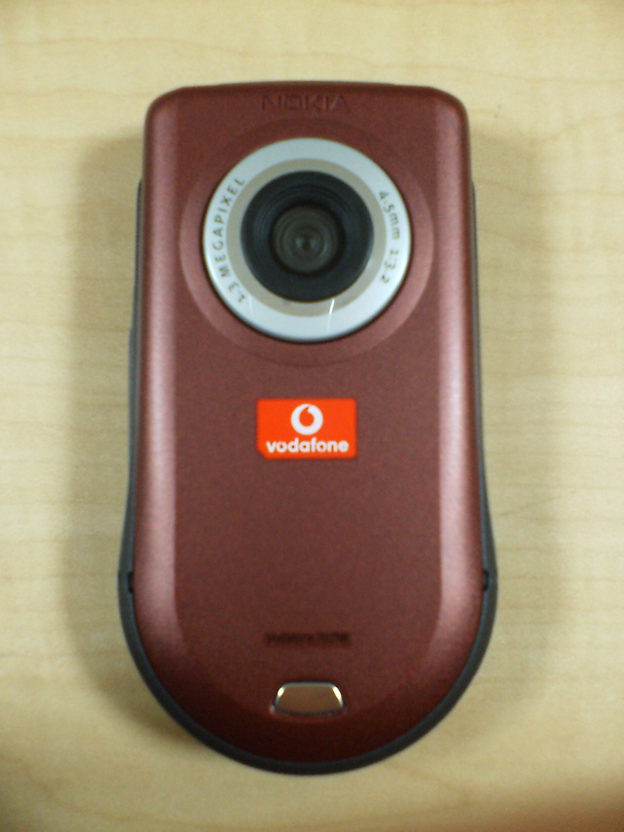 Vodafone 702NK (Nokia 6630) mobile phone